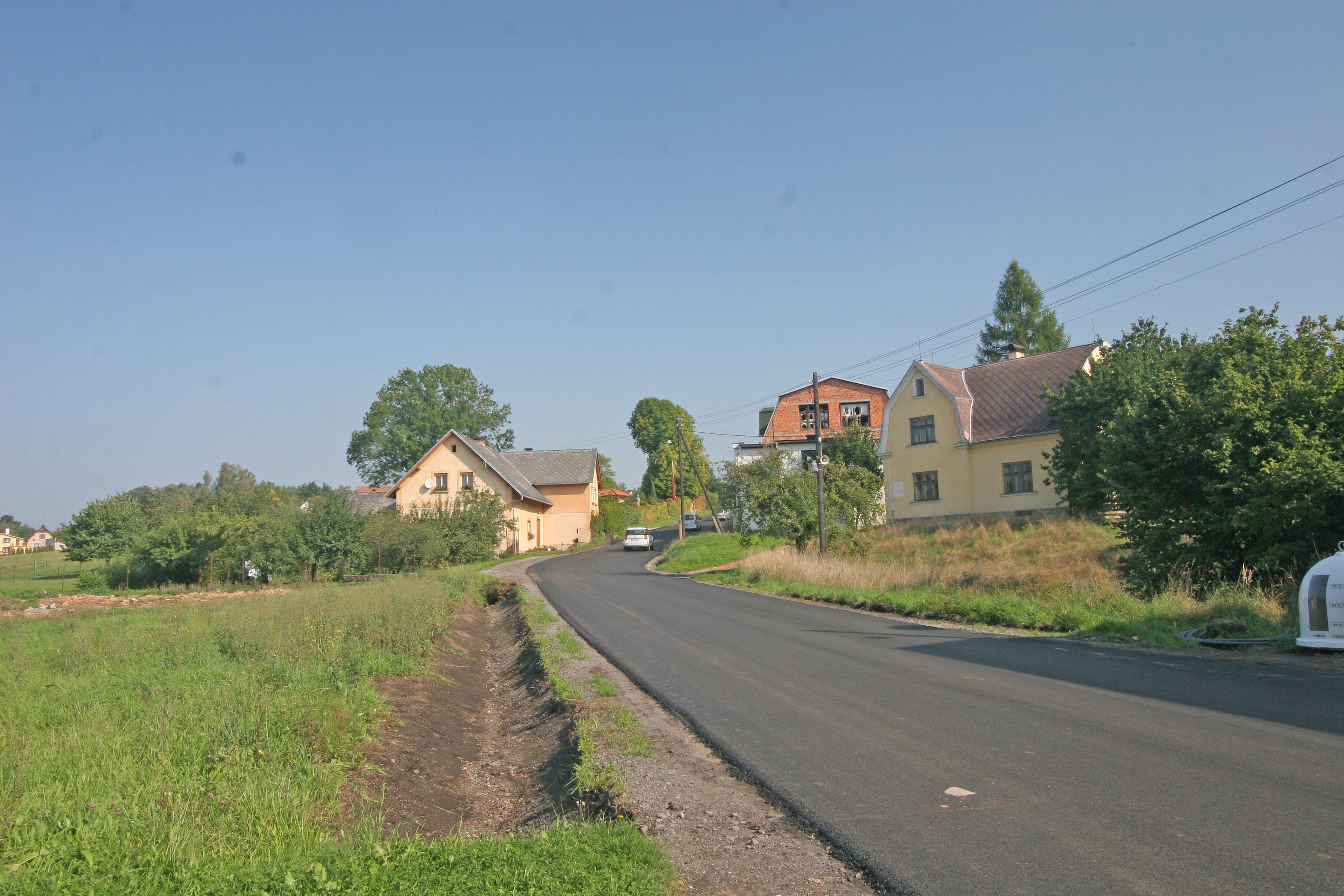 Vítězná čp. 294